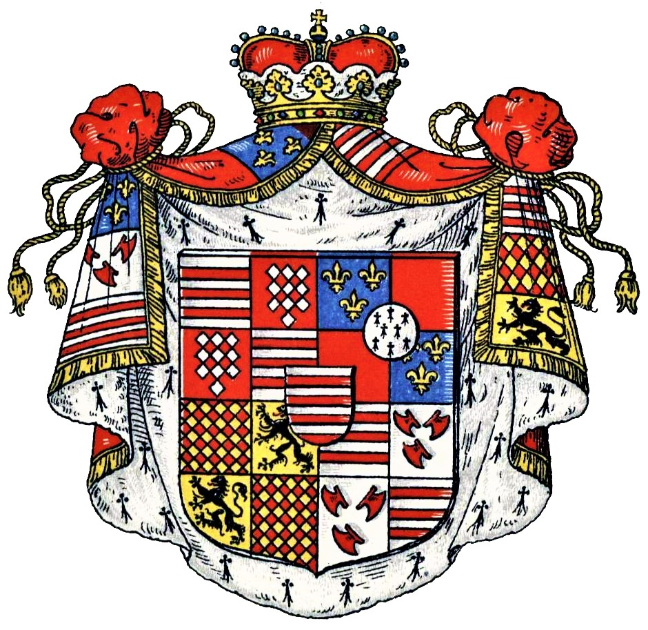 Wappen des Herzogs von Croy (aus der Hauptlinie Croy-Solre, Zweig Croy-Dülmen)